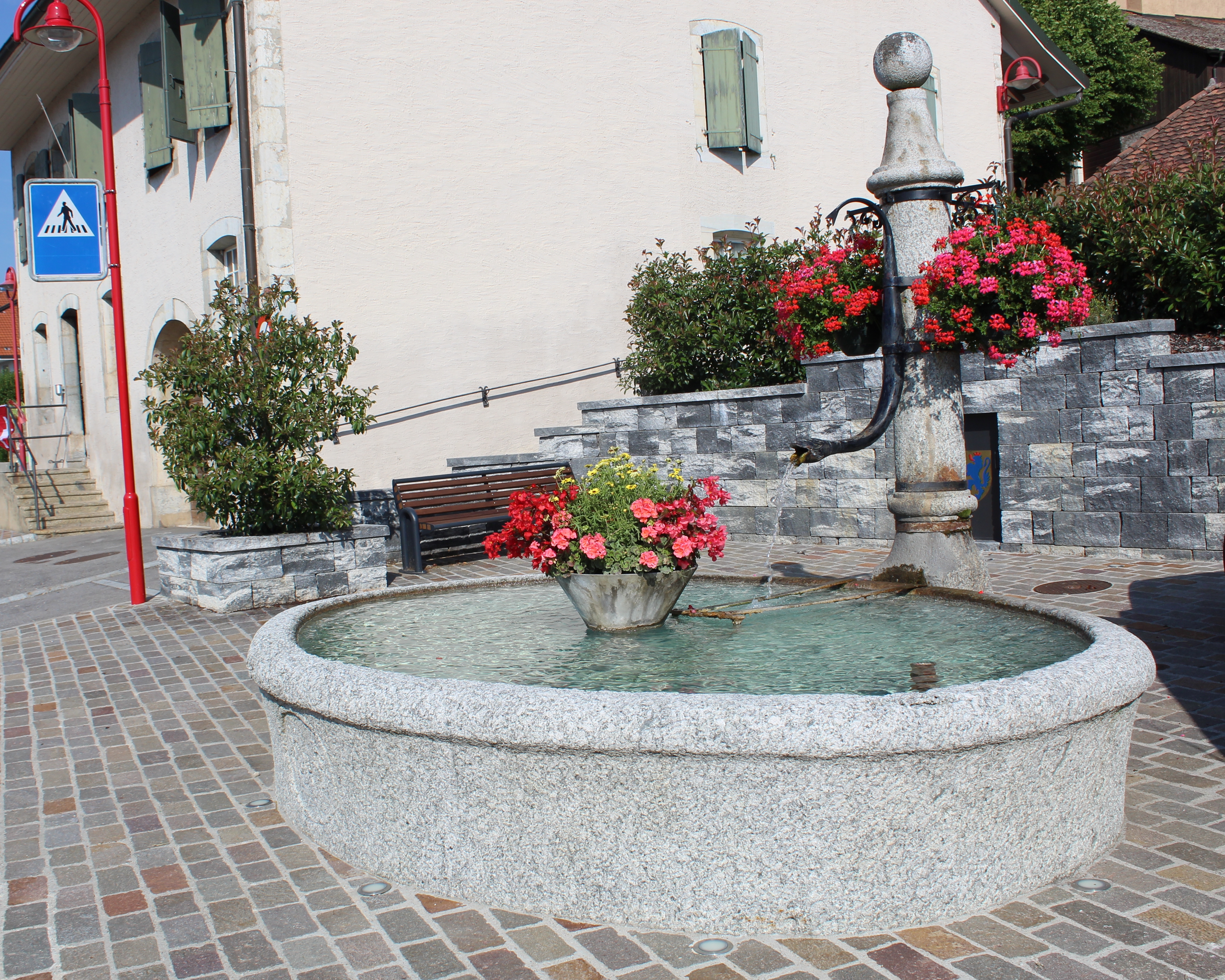 La fontaine